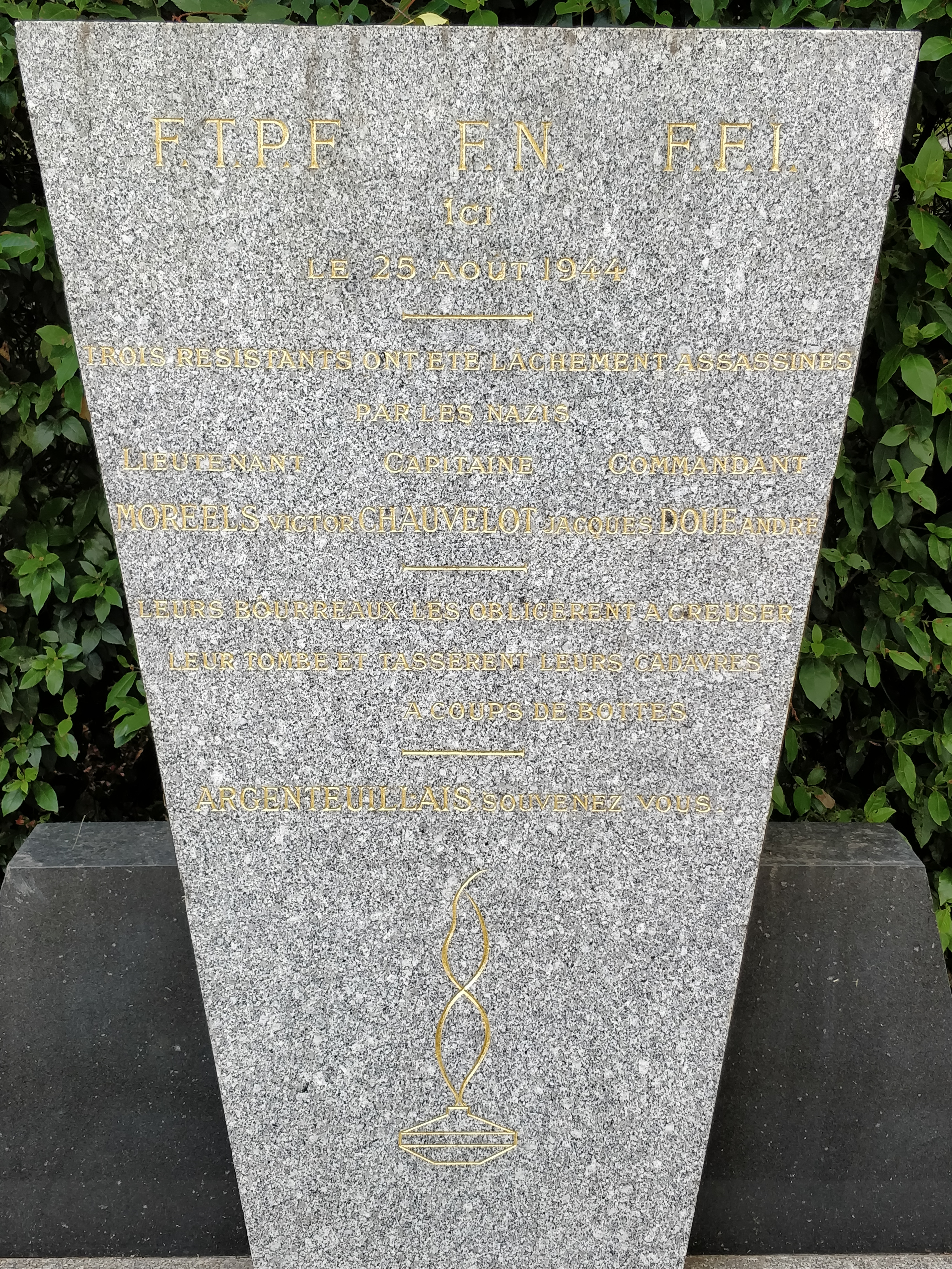 F.T.P.F F.N F.F.I Ici, le 25 aout 1944, trois résistants ont été lachement assassinés par les nazis : lieutenant Moreels Victor, Capitaine Chauvelot Jacques, Commandant Doué André. Leur bourreaux les obligèrent à creuser leur tombe et tassèrent leurs cadavres à coups de bottes. Argenteuillais, souvenez vous